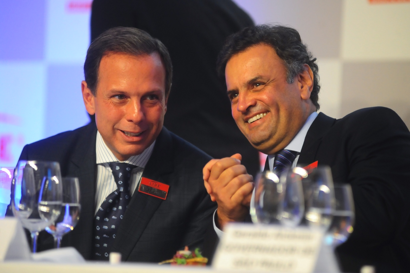 O presidente do PSDB, senador Aécio Neves, durante encontro com empresários do Grupo de Líderes Empresariais (LIDE), nesta segunda-feira (31/03), em São Paulo. Em palestra, o senador falou sobre novos rumos para o Brasil. Aécio Neves estava acompanhado dos governadores de São Paulo, Geraldo Alckmin, e de Minas Gerais, Antonio Anastasia, entre outras lideranças. Foto: George Gianni